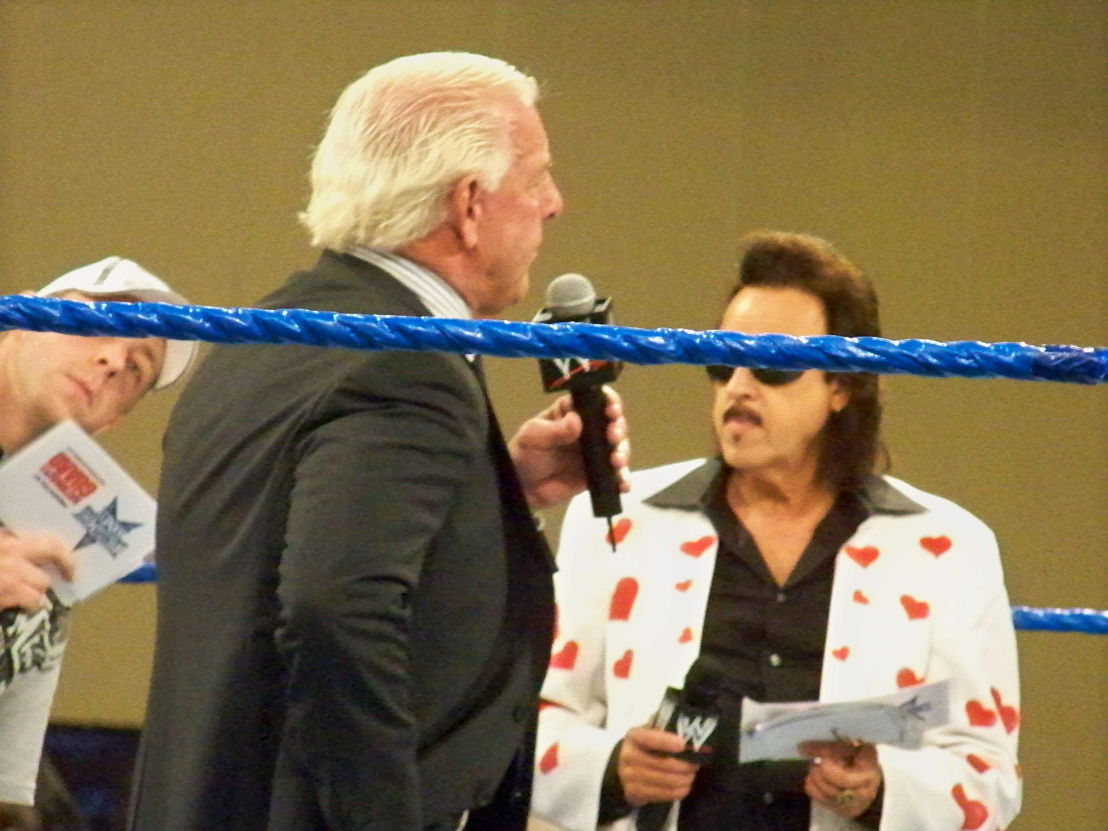 avec Jimmy Hart